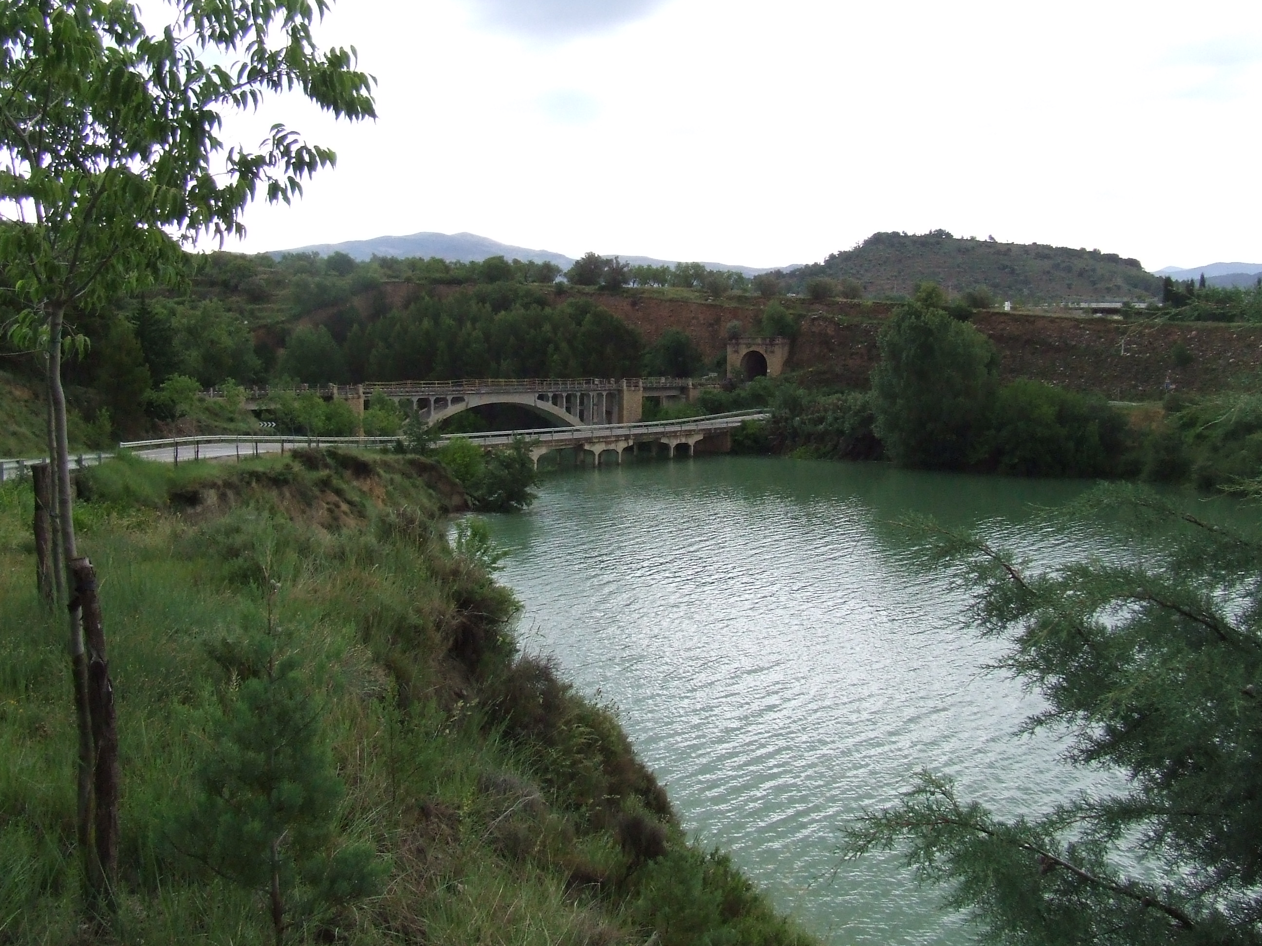 El Pont dels Palillos, el del ferrocarril i el pantà de Sant Antoni (Salàs de Pallars, Pallars Jussà)